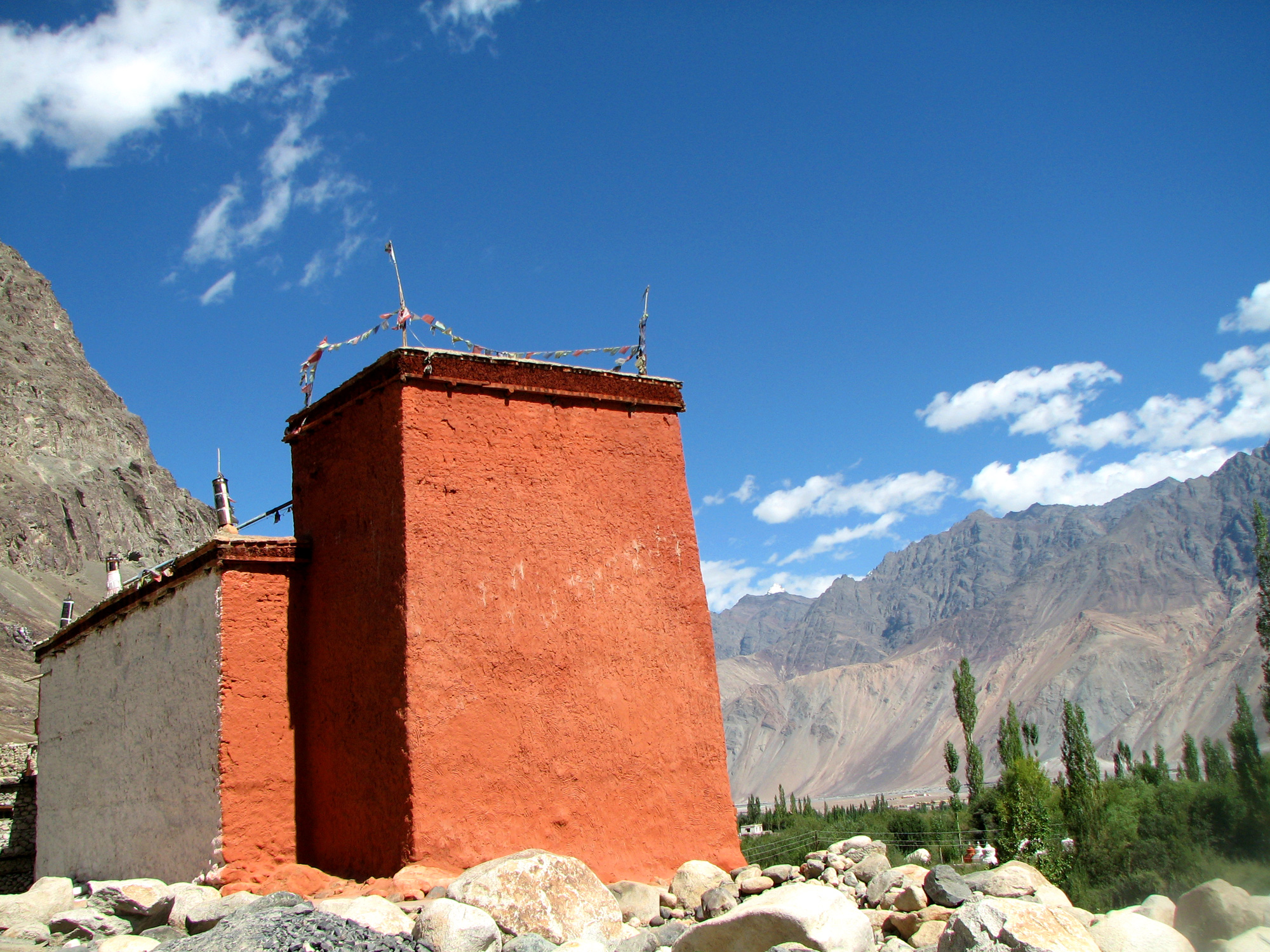 Hundur Gompa, Numbra valley, Ladakh.